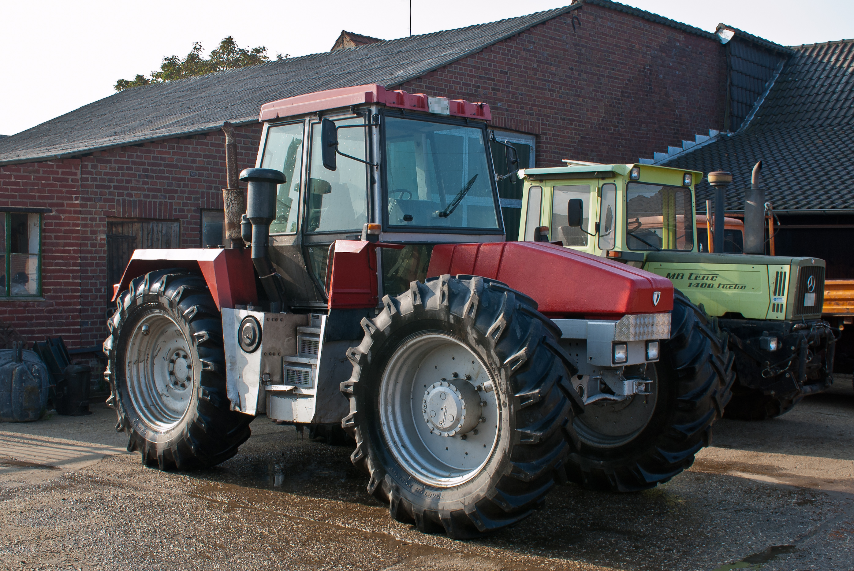 Schlüter Eurotrac 200, dahinter ein MB-Trac 1400 turbo. An dem Schlüter sind die Vorderreifen gedreht. Die Stollen zeigen also nach hinten. Man verspricht sich von dieser Methode einen gleichmäßigeren Verschleiß der Reifen.